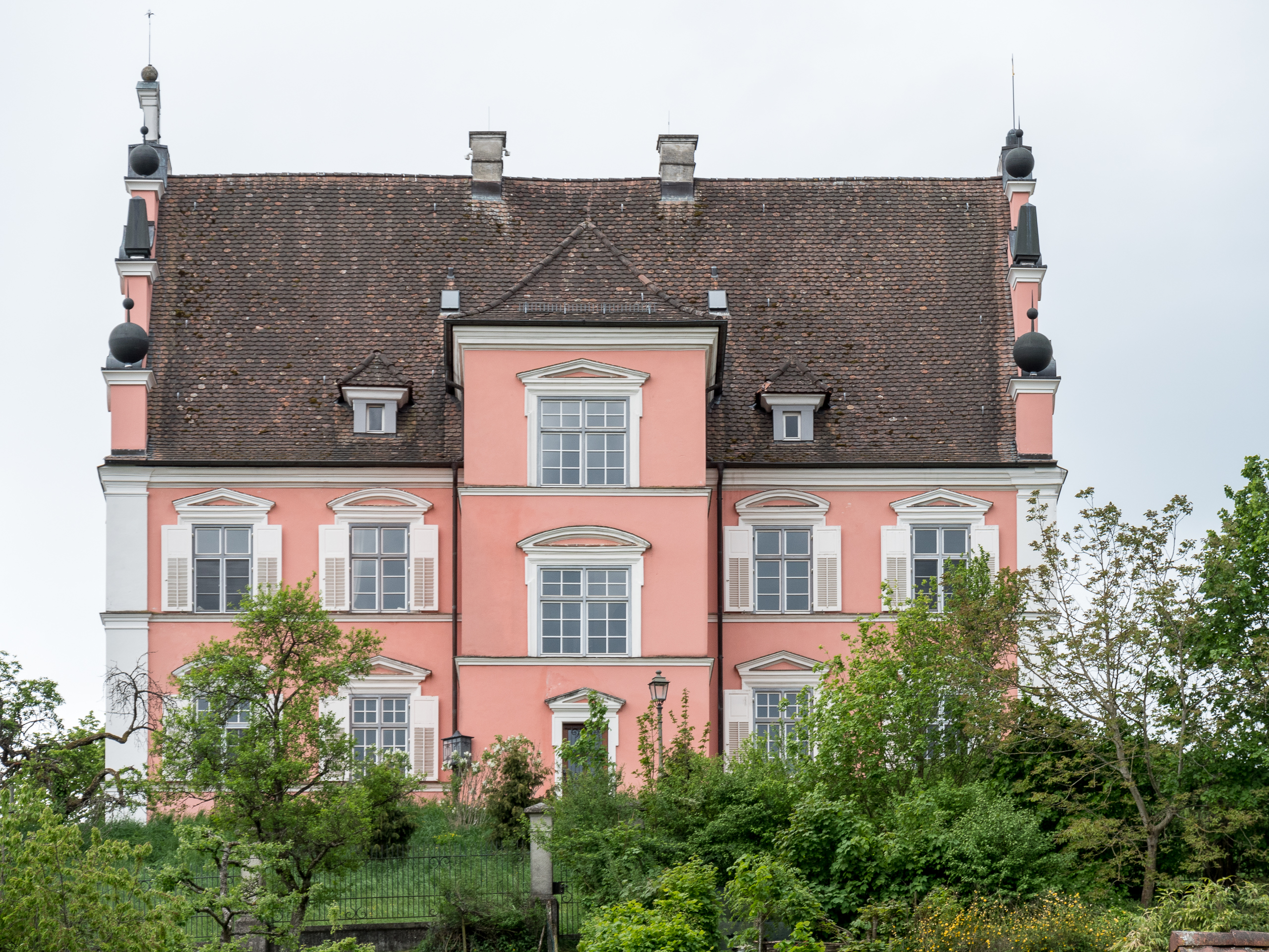 Schloss Freudental (Allensbach) - Ostseite